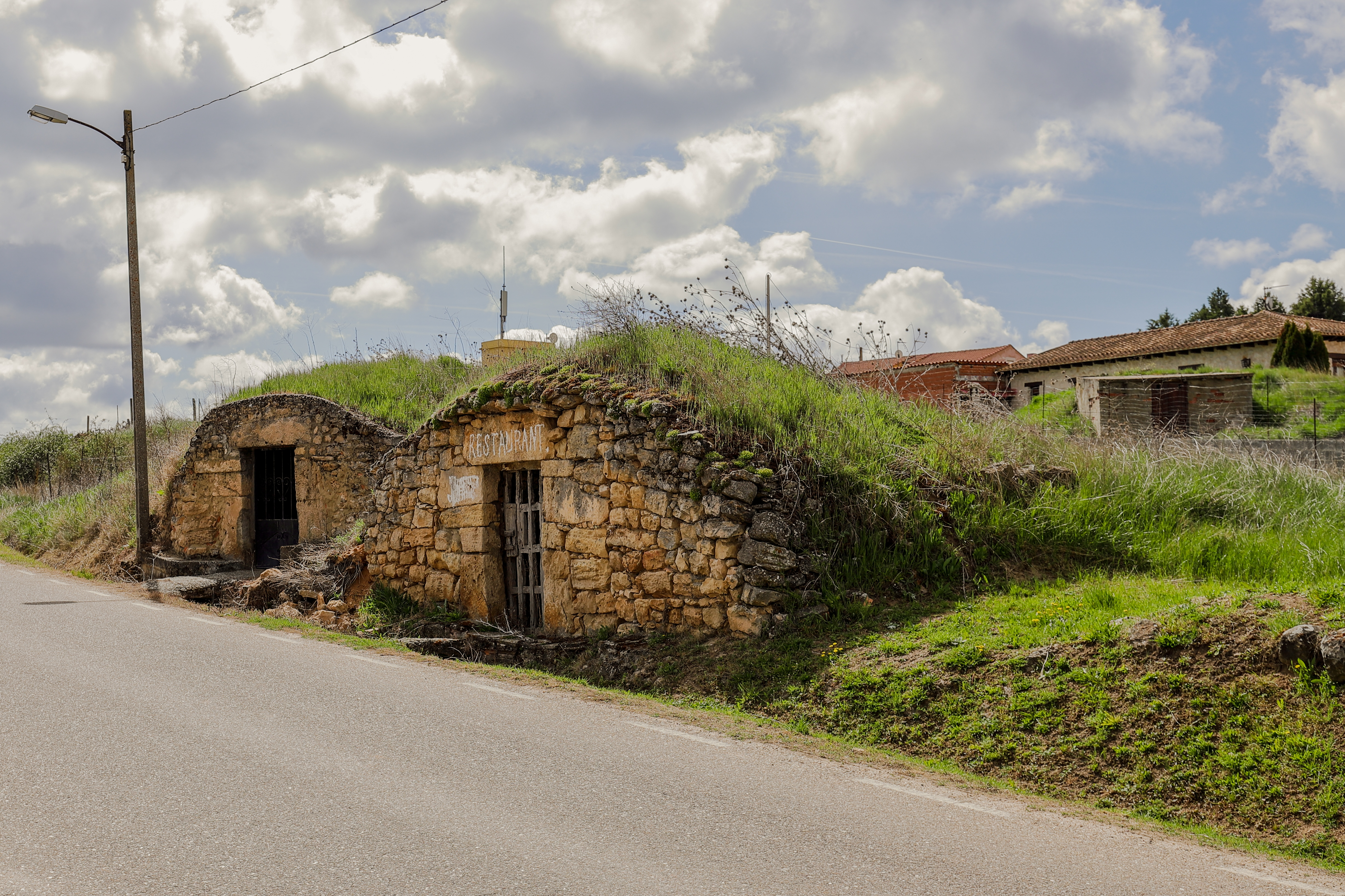 Villanueva de Gumiel es un municipio de la comarca Ribera del Duero, provincia de Burgos.